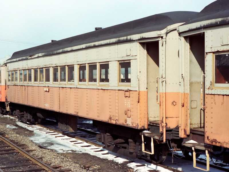 Tsugaru Railway. Passenger car.Oha31-3.（津軽鉄道 オハ31 3）